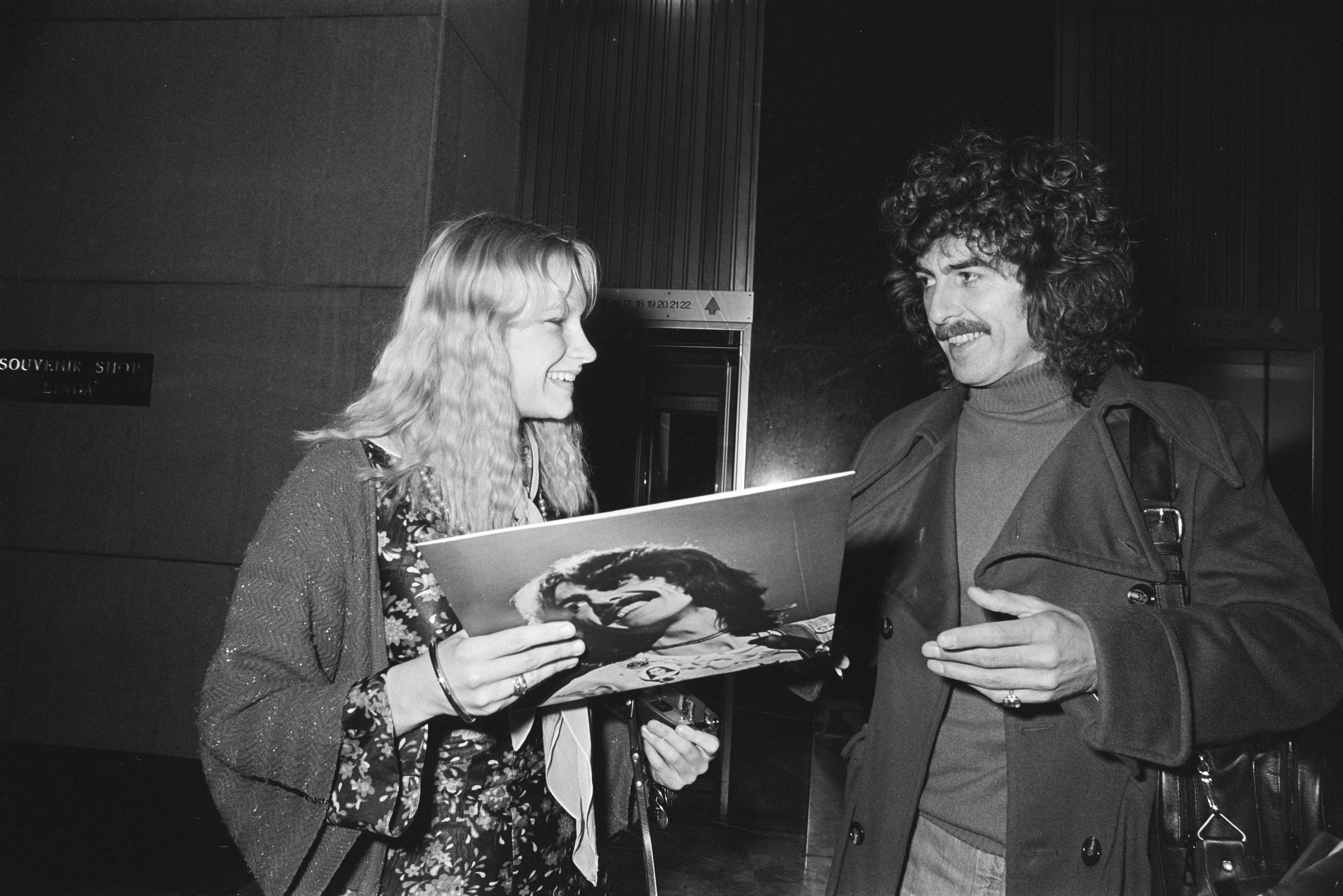 George Harrison verlaat Hilton Hotel Amsterdam en geeft handtekening. Datum 4 februari 1977